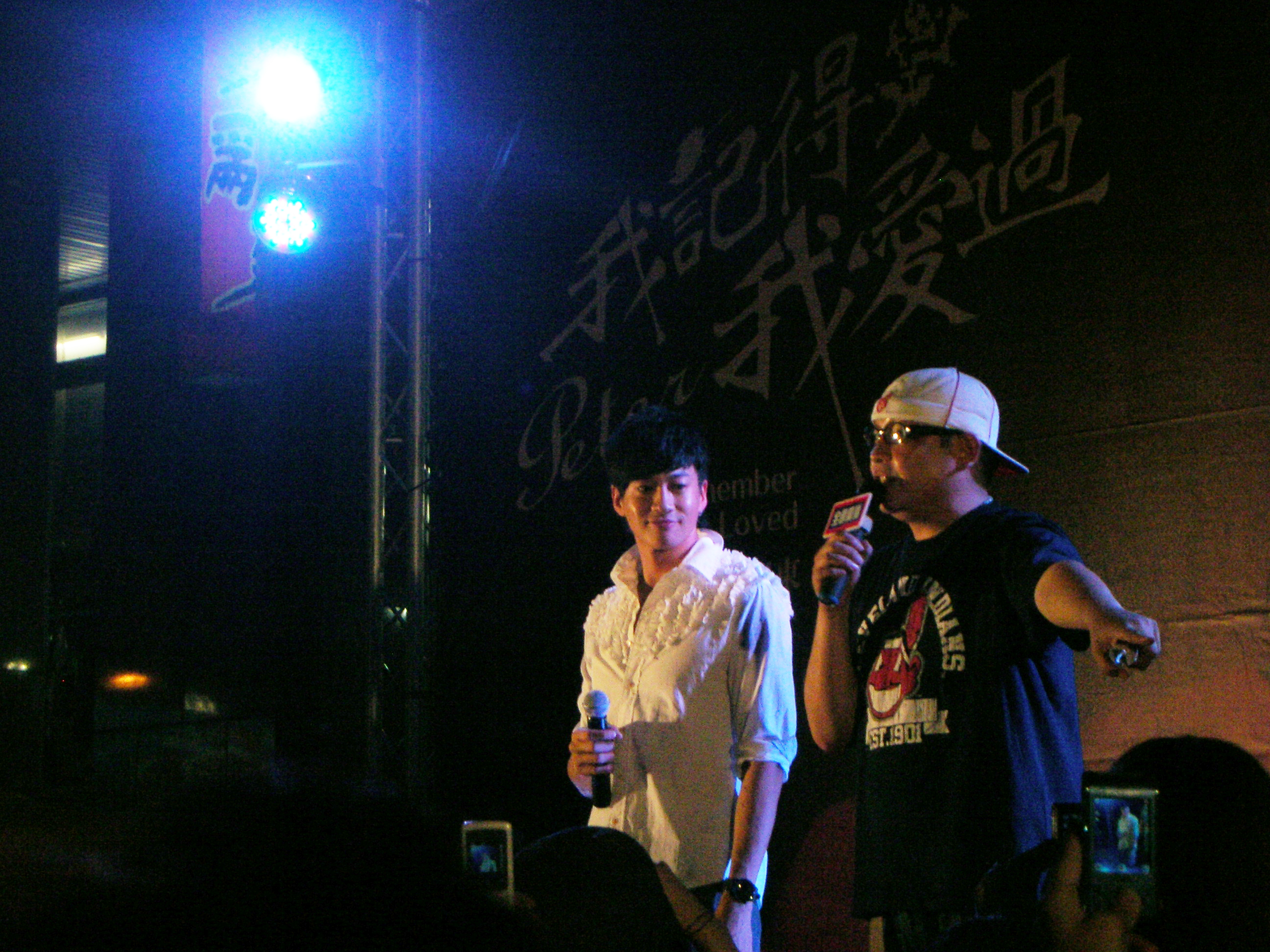 何潤東在「我記得我愛過」的簽唱會